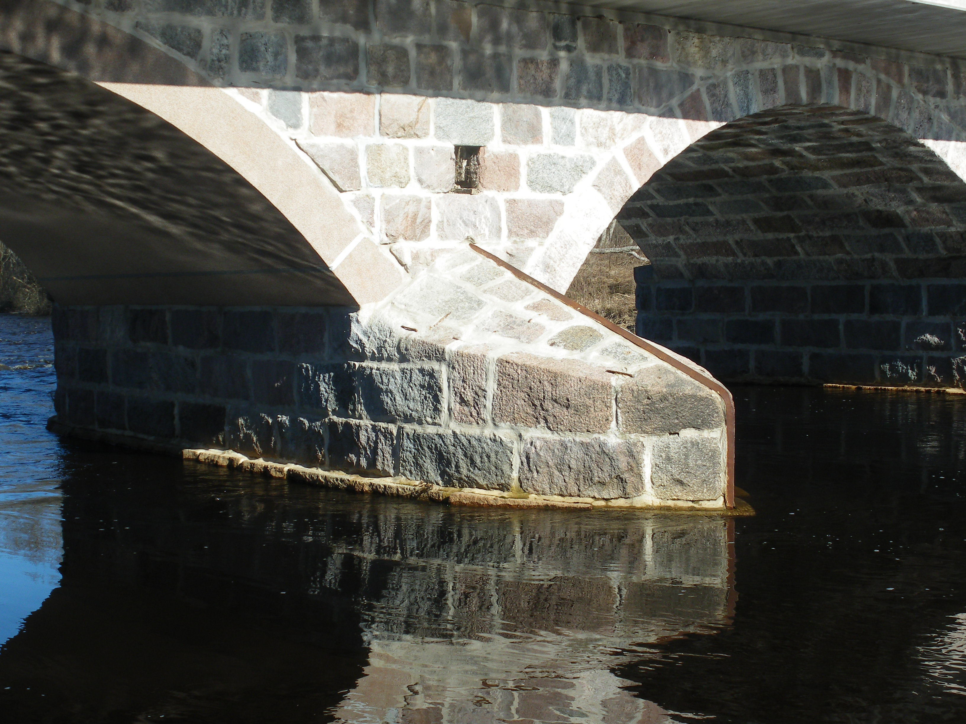 Soodla kivisilla jõesammas jäämurdjaga.